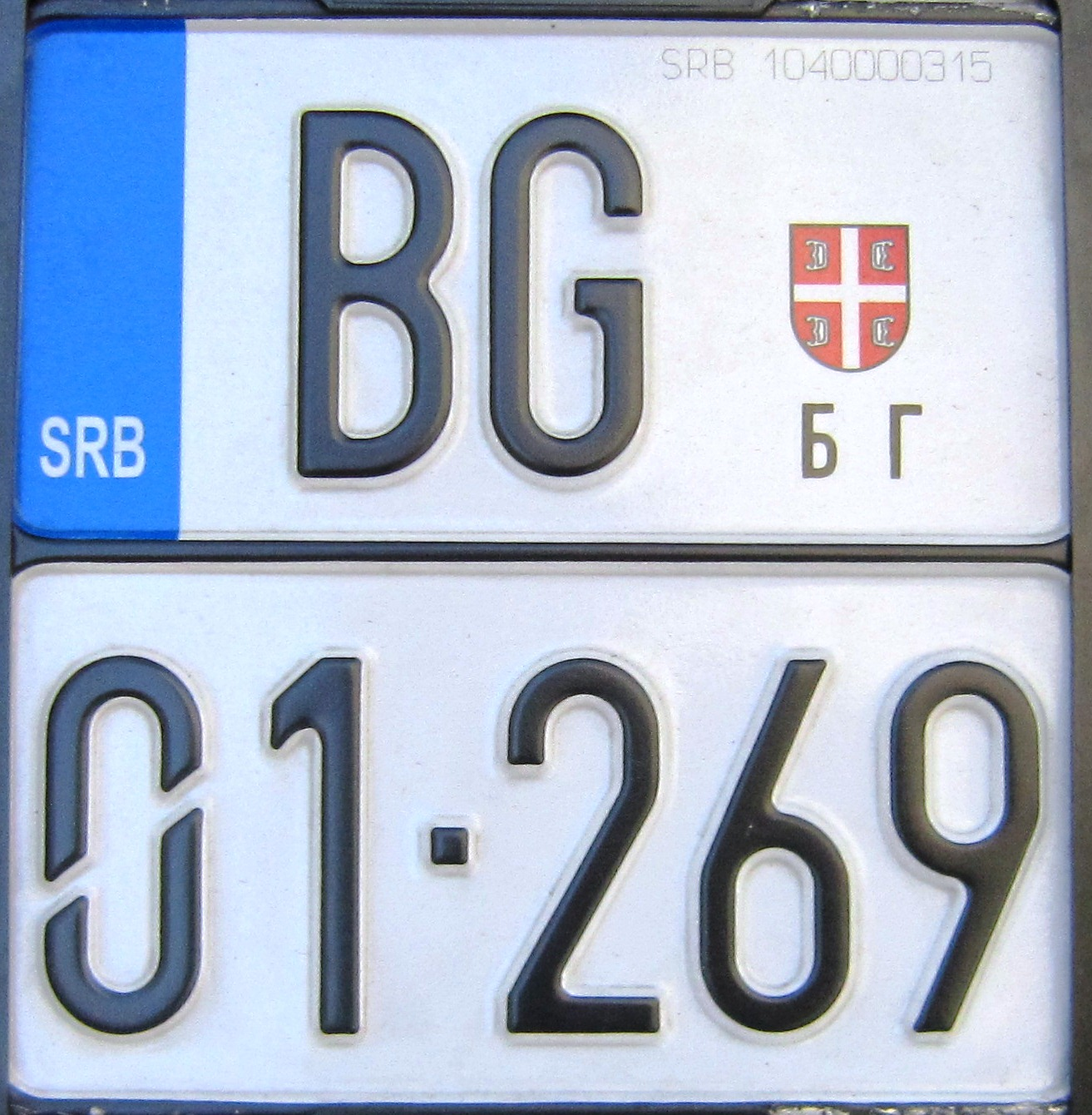 Servië motor kentekenplaat Belgrado